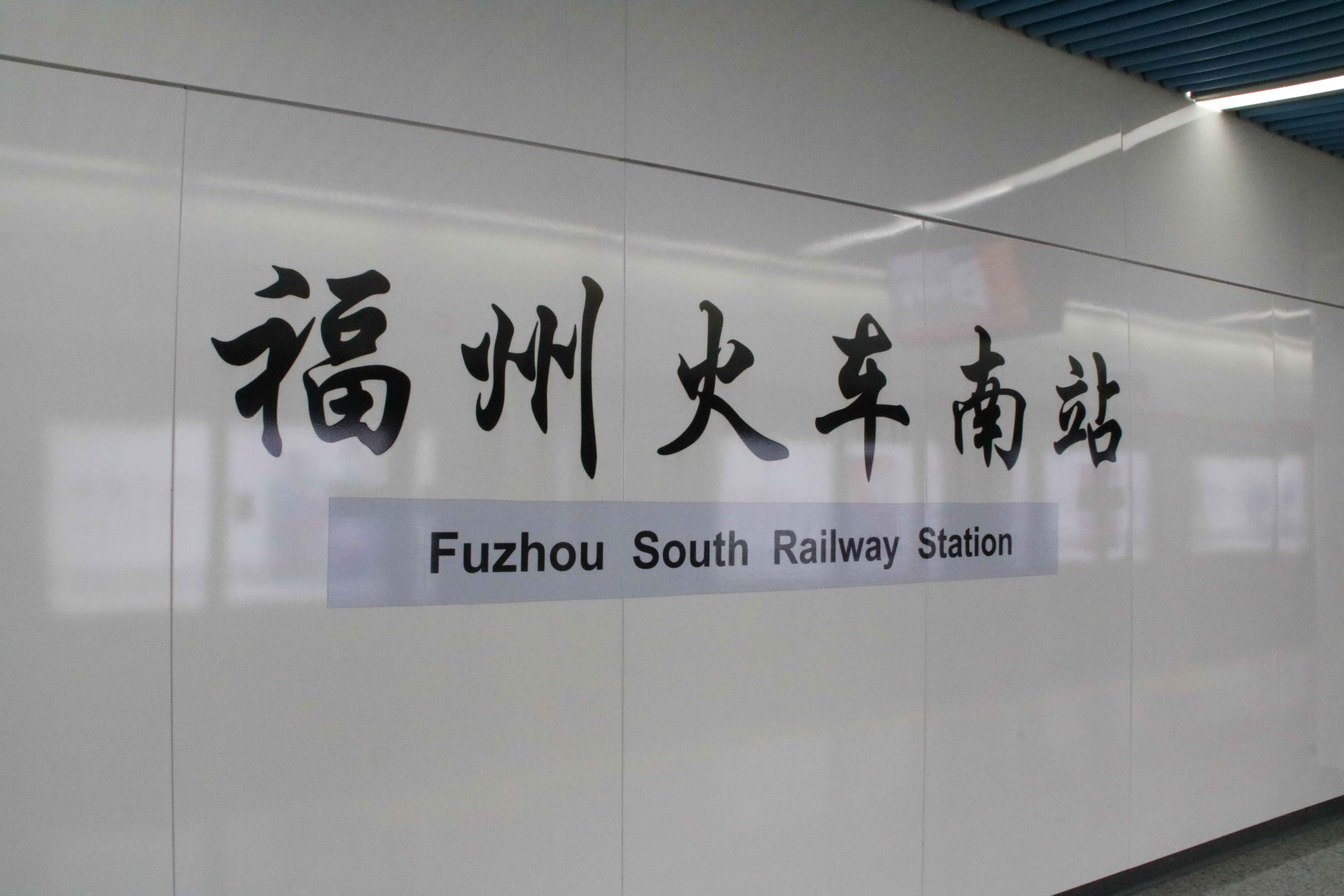 地铁福州火车南站站牌